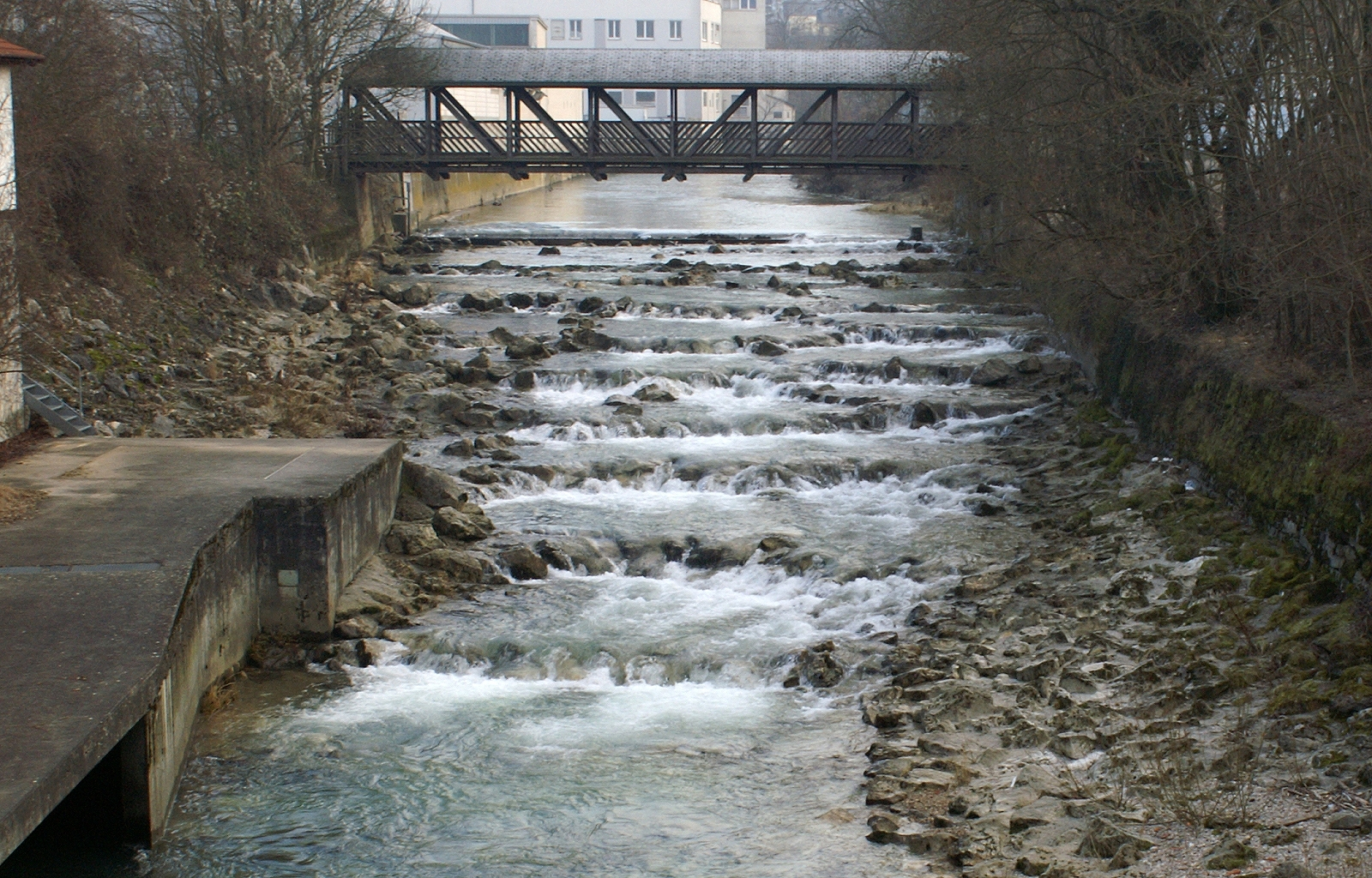 Wasserkraftanlage an der Fils am westlichen Stadtrand von Göppingen mit Rauer Rampe und Tiroler Wehr